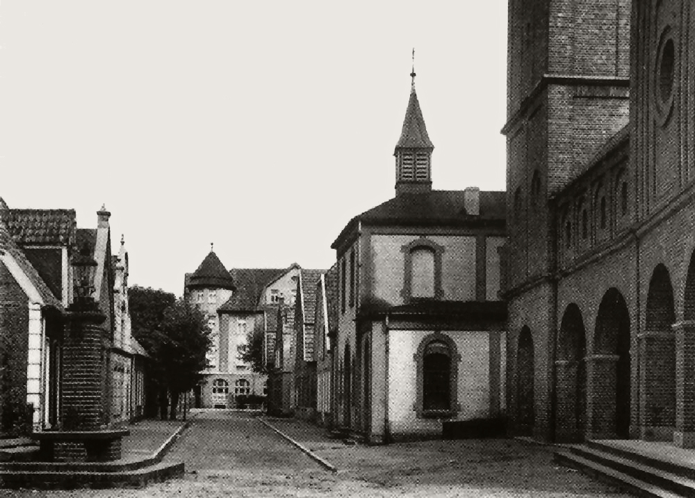 Nordhorn